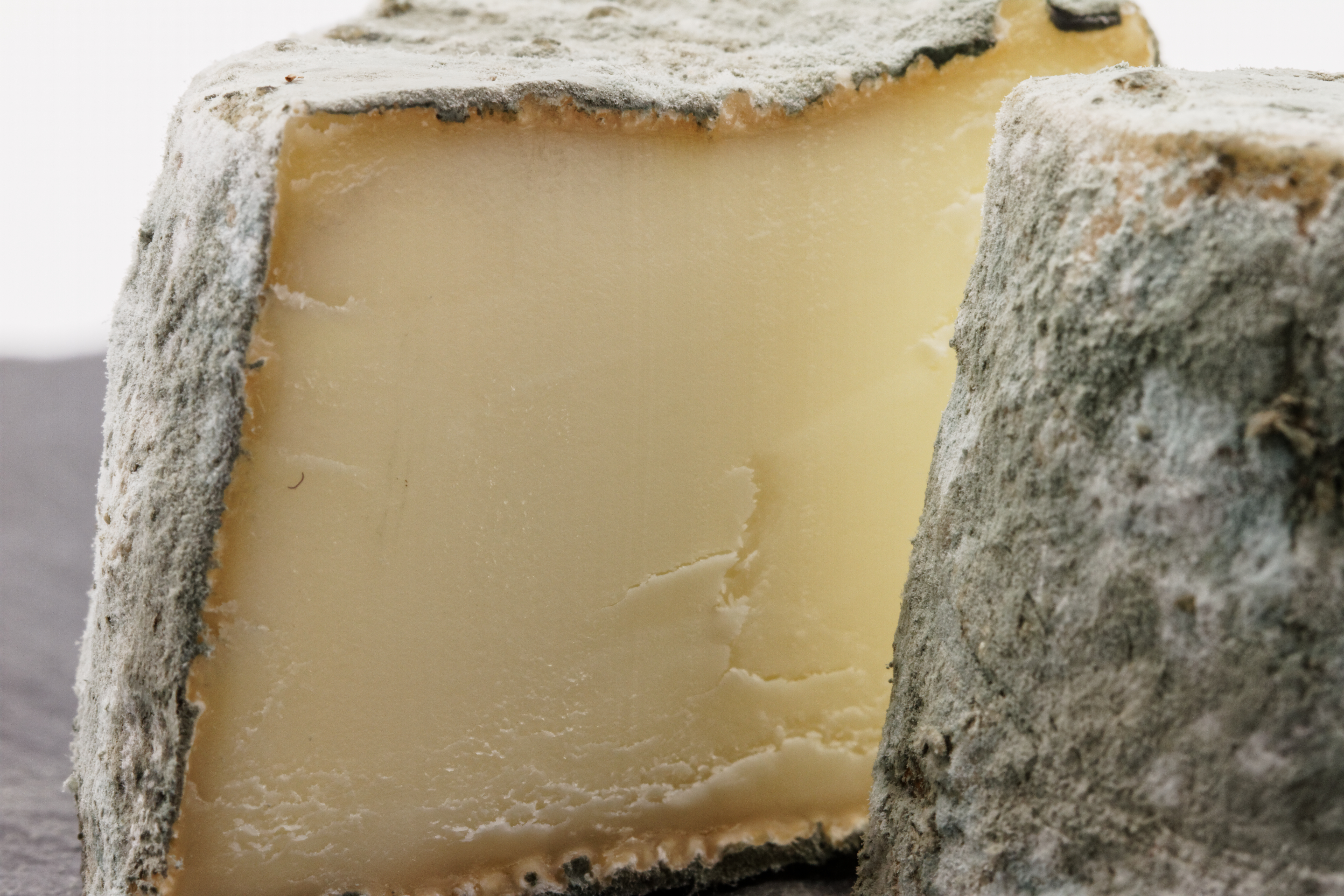 Le Mâconnais, fromage de Saône-et-Loire.